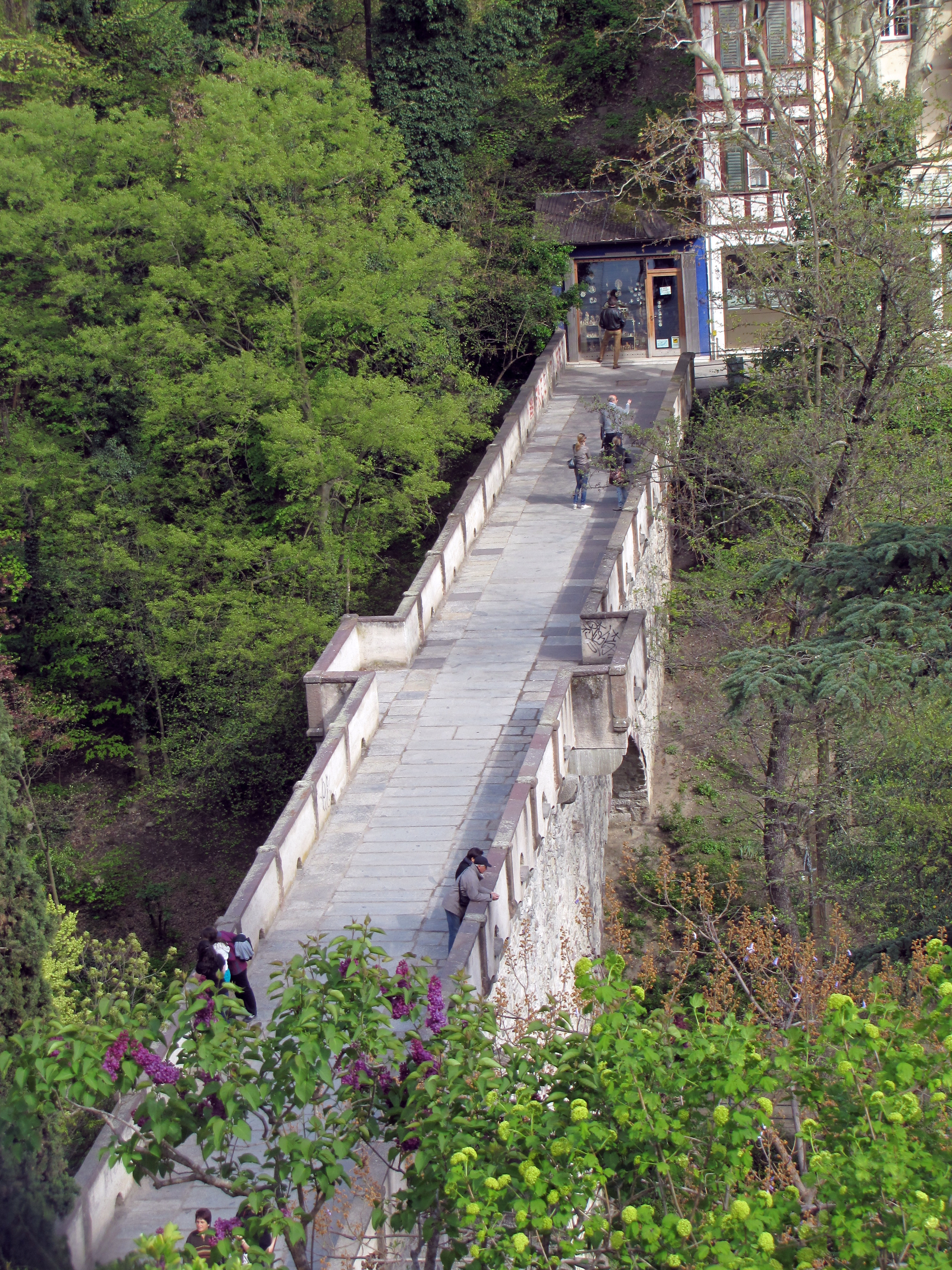 Steinerner Steg